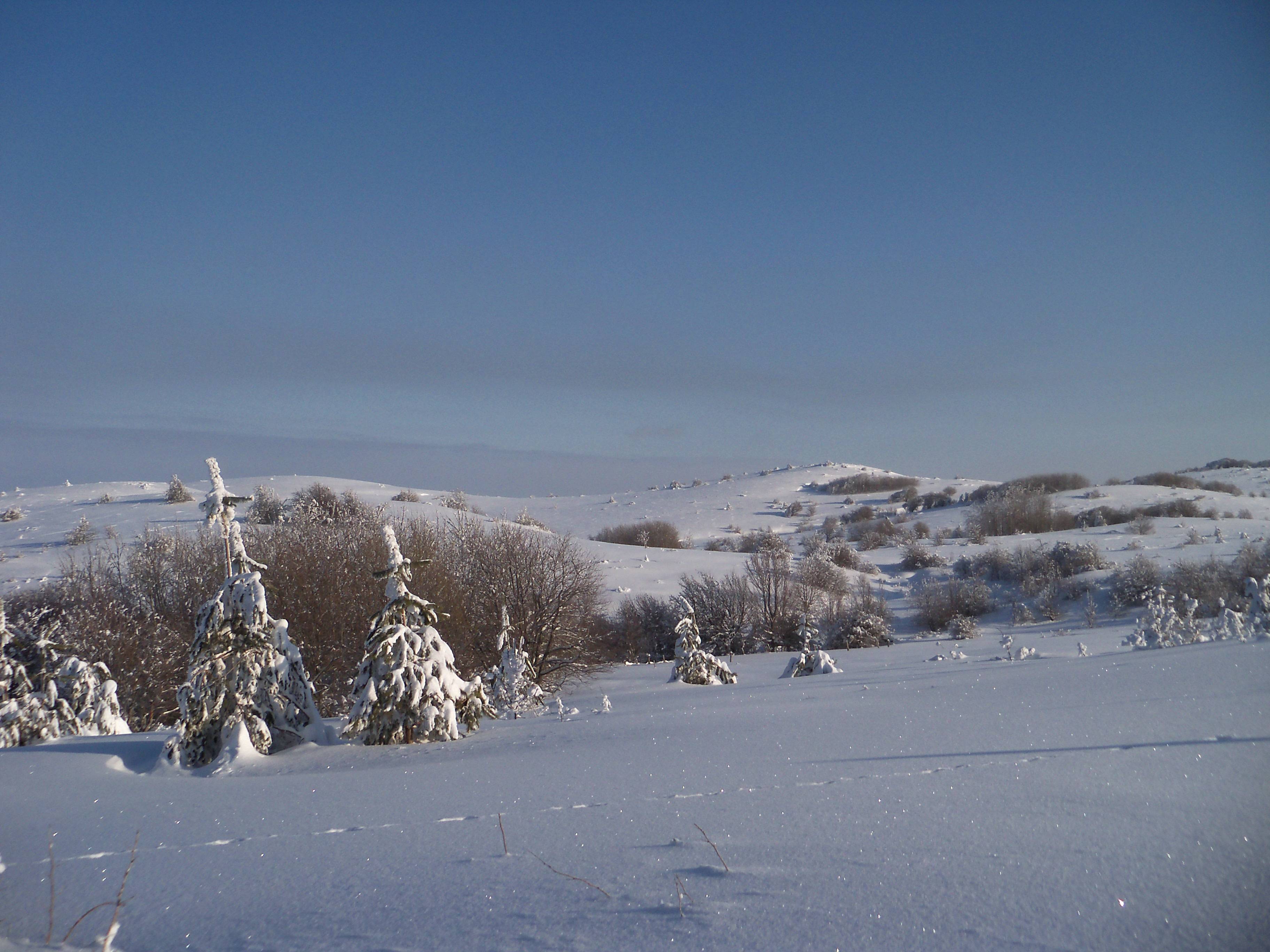 Долгоруківська яйла